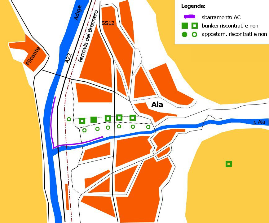 Sbarramento Ala nord Piantina